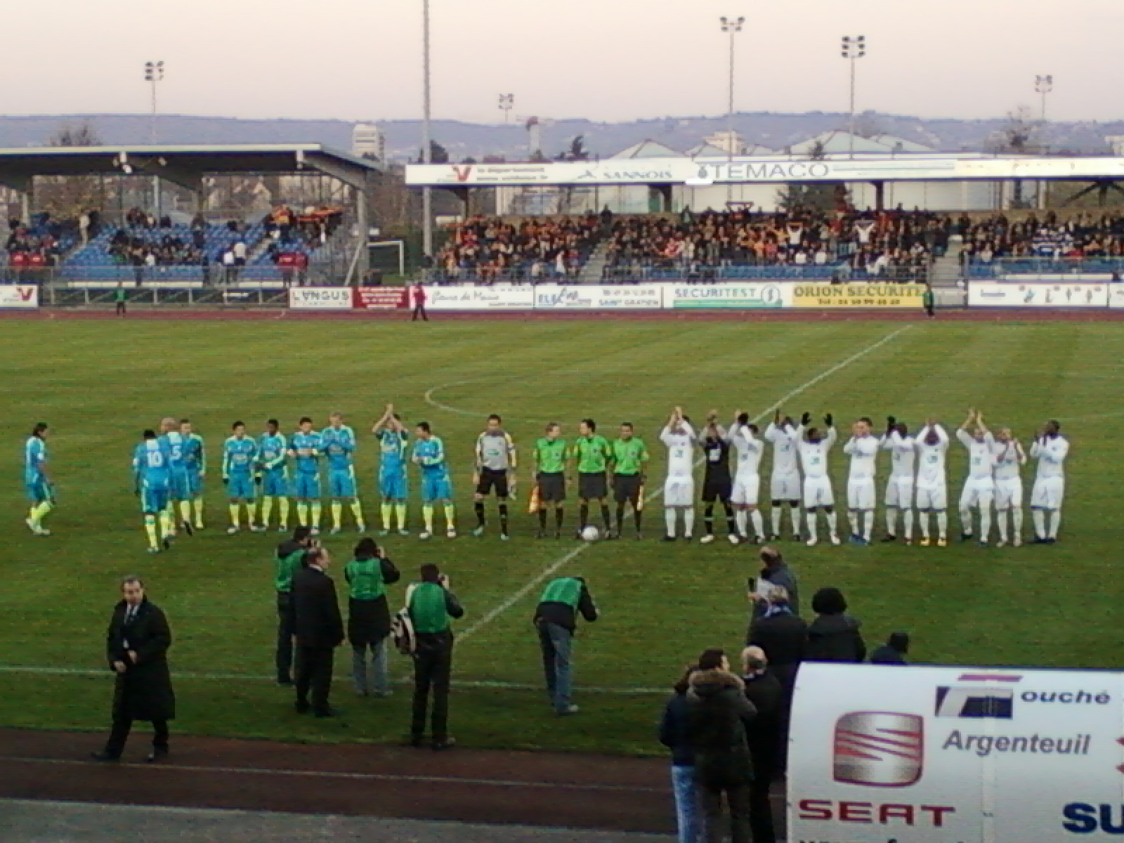 Présentation des équipes lors du match Entente Sannois Saint-Gratien - RC Lens du 19 novembre 2011 (7ème tour de Coupe de France)